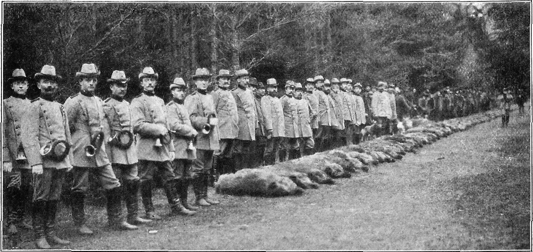 Das Ende einer Wildschwein-Jagd